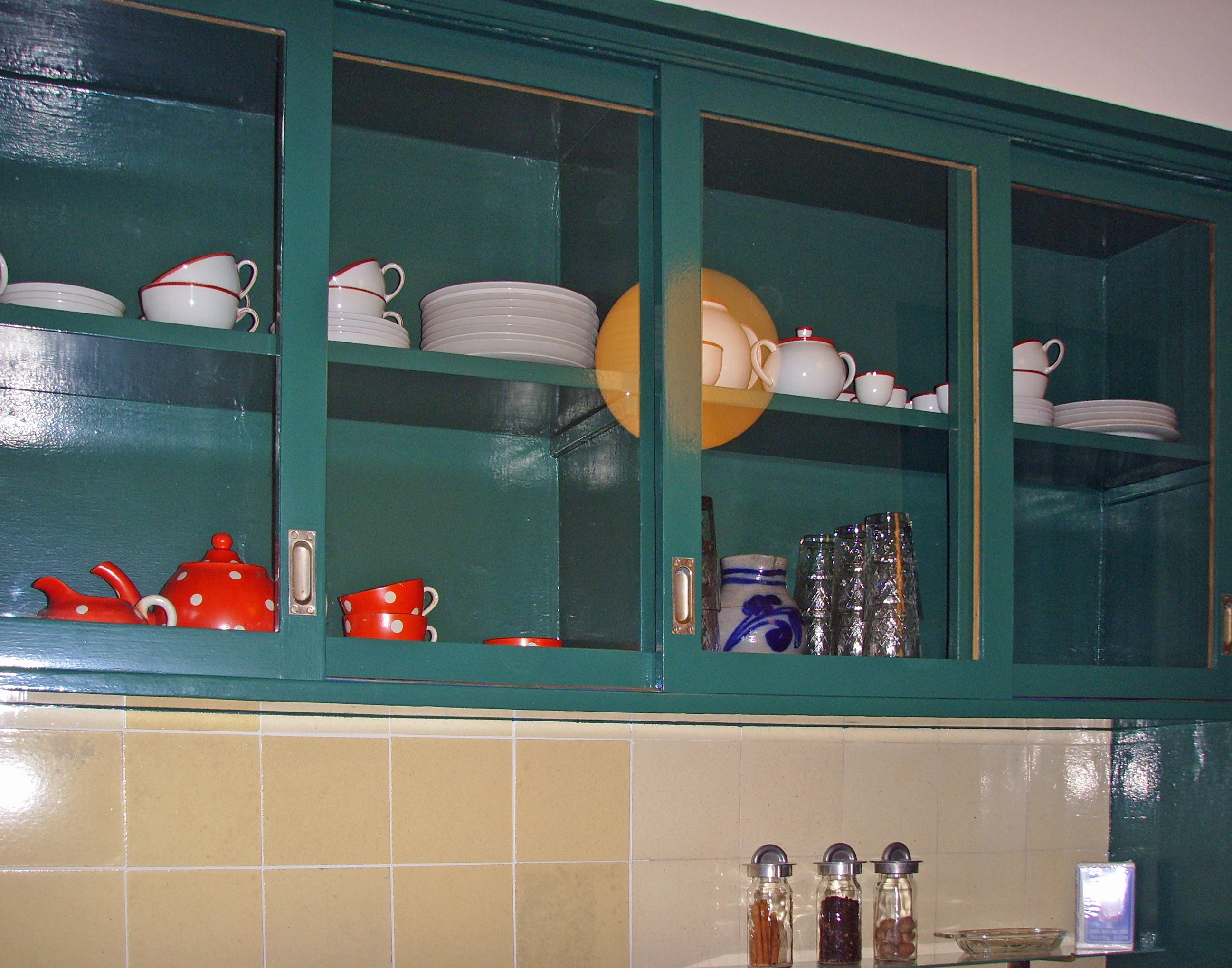 Hängeschränke (Originale am ursprünglichen Platz) einer Frankfurter Küche. Ernst-May-Haus, Im Burgfeld 136, Frankfurt am Main-Römerstadt